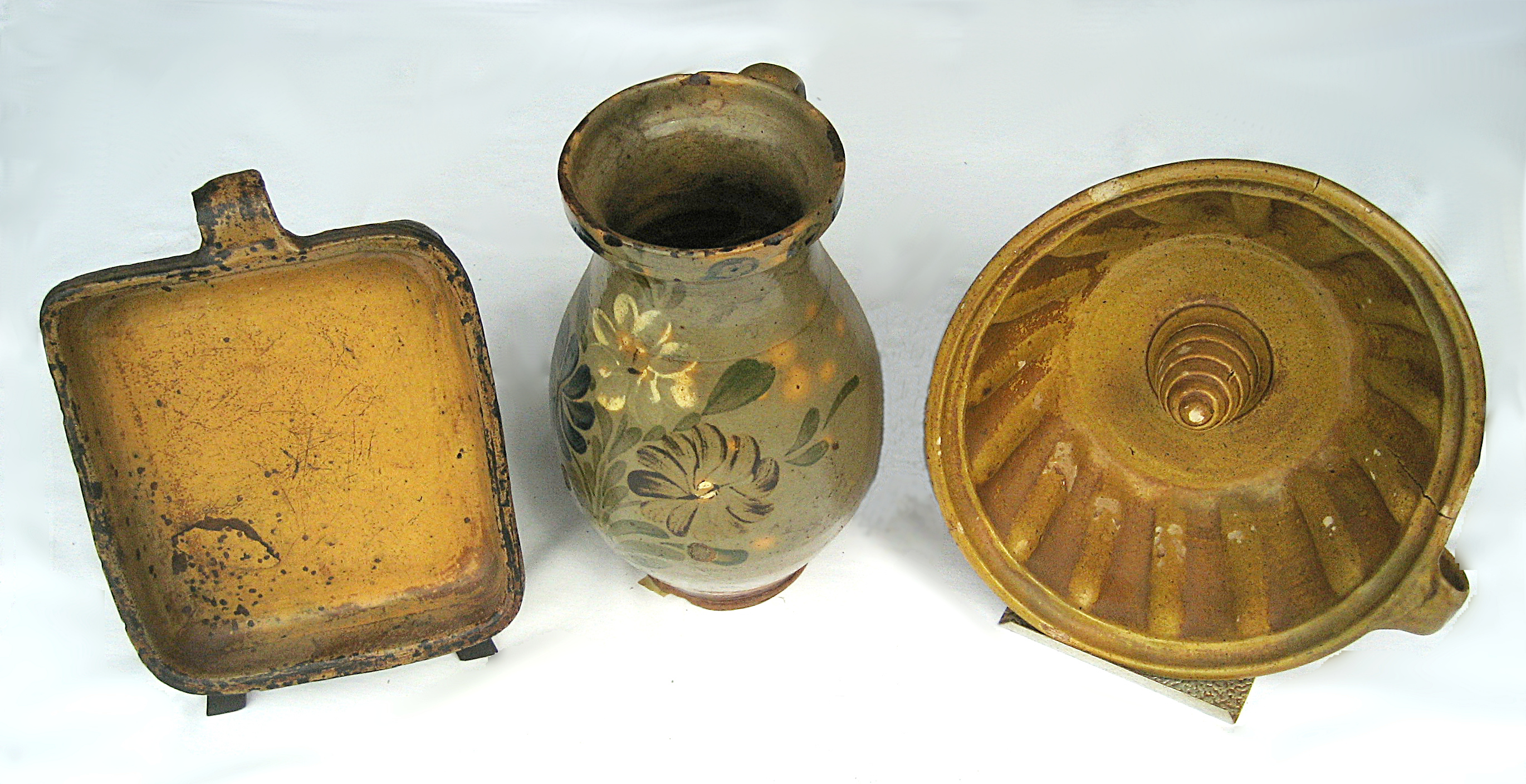 Drei Erzeugnisse aus Niederbayern / Rottal